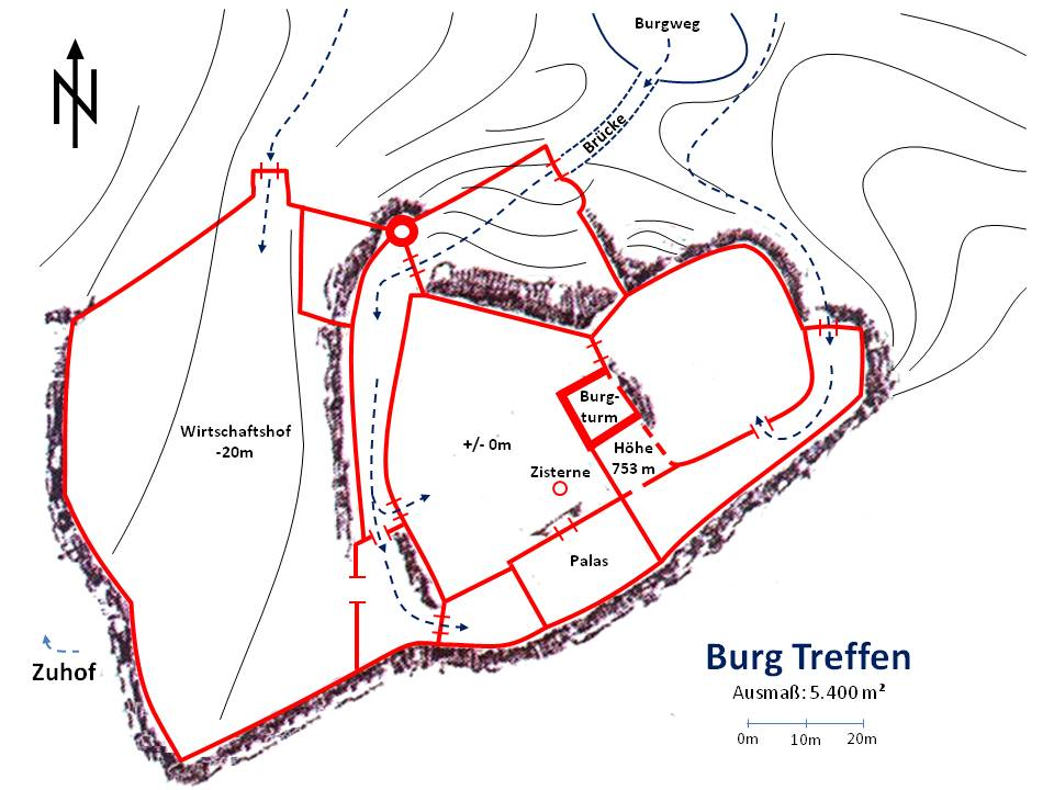 Grundriss der Burg Treffen (Kärnten). Die Gründung der Burg erfolgte um 1065 durch Graf Markwart v. Eppenstein. Die Grafen und Kärntner Herzöge von Eppenstein gehörten zu jener Zeit zu den mächtigsten Dynastien im südöstlichen Alpenraum. Um 1090 geht die Burg und weitere Eppensteiner Besitzungen durch eine Heirat an den Grafen Wolfrad aus dem schwäbischen Dynastengeschlecht der Grafen von Veringen. Ab 1121 trat er als Graf „von Treffen“ auf.